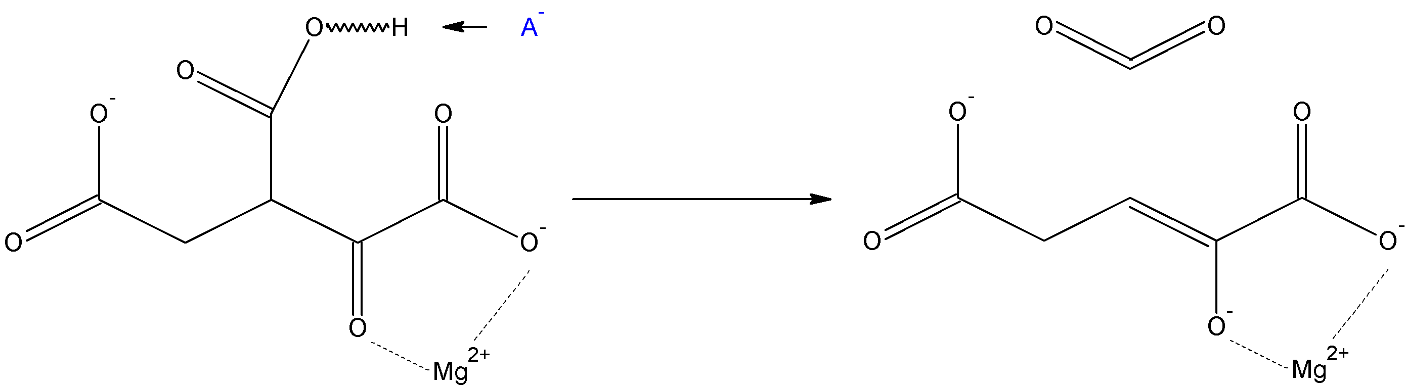 Segunda etapa de la reacción catalizada por la IDH. Realizado con ACD/ChemSketch.